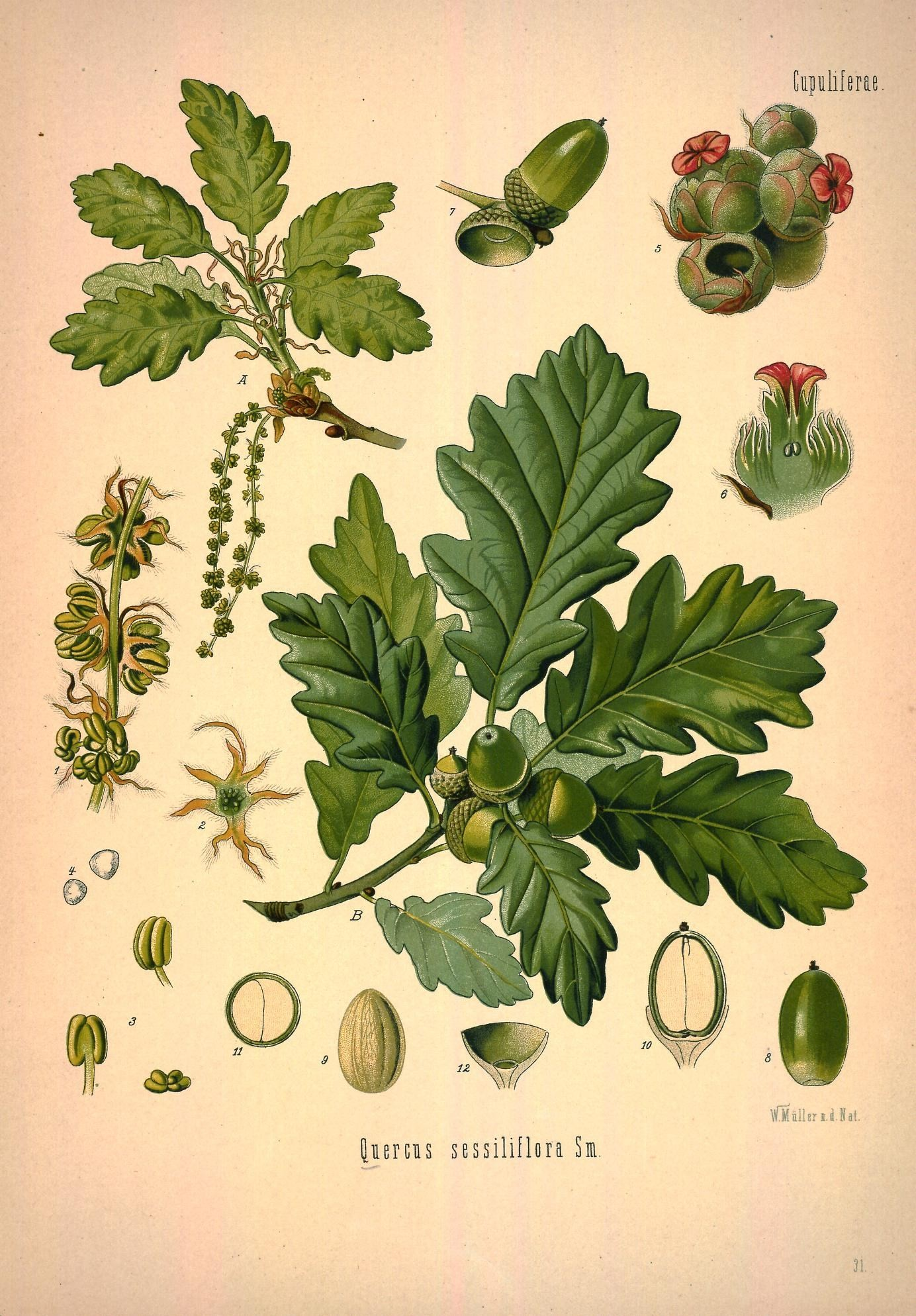 Traubeneiche. A blühender und B fruchtender Zweig in natürl. Grösse; 1 männliches Kätzchen, vergrössert; 2 Perigon der männlichen Blüthe, desgl.; 3 Staubgefässe, desgl.; 4 Pollen, desgl.; 5 weiblicher Blüthenknaul, desgl.; 6 weibliche Blüthe, zerschnitten, desgl.; 7 Frucht, natürl. Grösse; 8 Same mit Fruchtschale, desgl.; 9 derselbe ohne Fruchtschale desgl.; 10 Frucht im Längsschnitt, desgl.; 11 dieselbe im Querschnitt, desgl.; 12 Becher (Cupula) im Längsschnitt desgl.